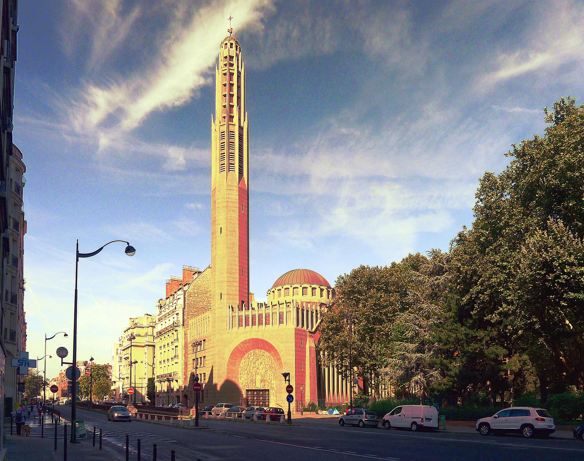 Avenue Stéphane-Mallarmé avec l'église Sainte-Odile - Paris XVII